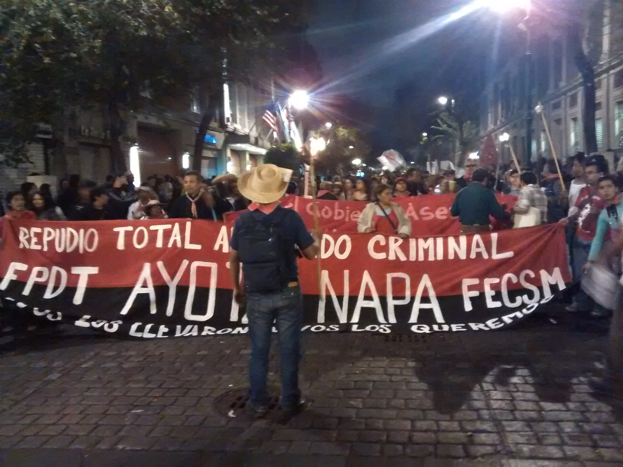 Marcha por la justicia y aparición con vida de los 43 normalistas de Ayotzinapa desaparecidos en Iguala.